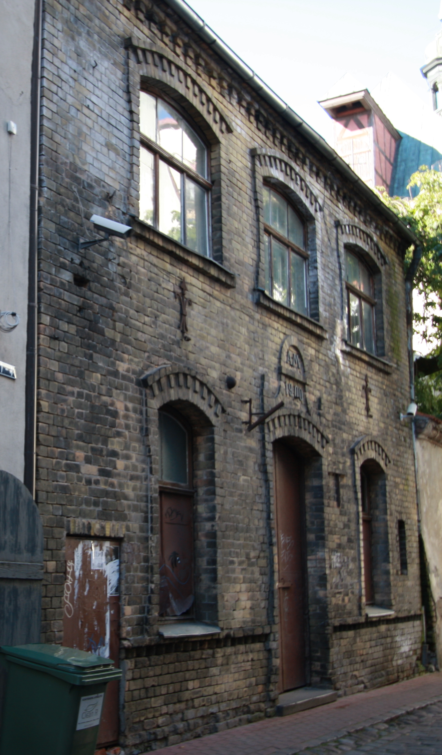 Dzīvojamo ēku un noliktavu komplekss, Rīga, Alksnāja iela 7; Alksnāja iela 8; Alksnāja iela 5; Alksnāja iela 9; Alksnāja iela 11; Alksnāja iela 14; Vecpilsētas iela 9